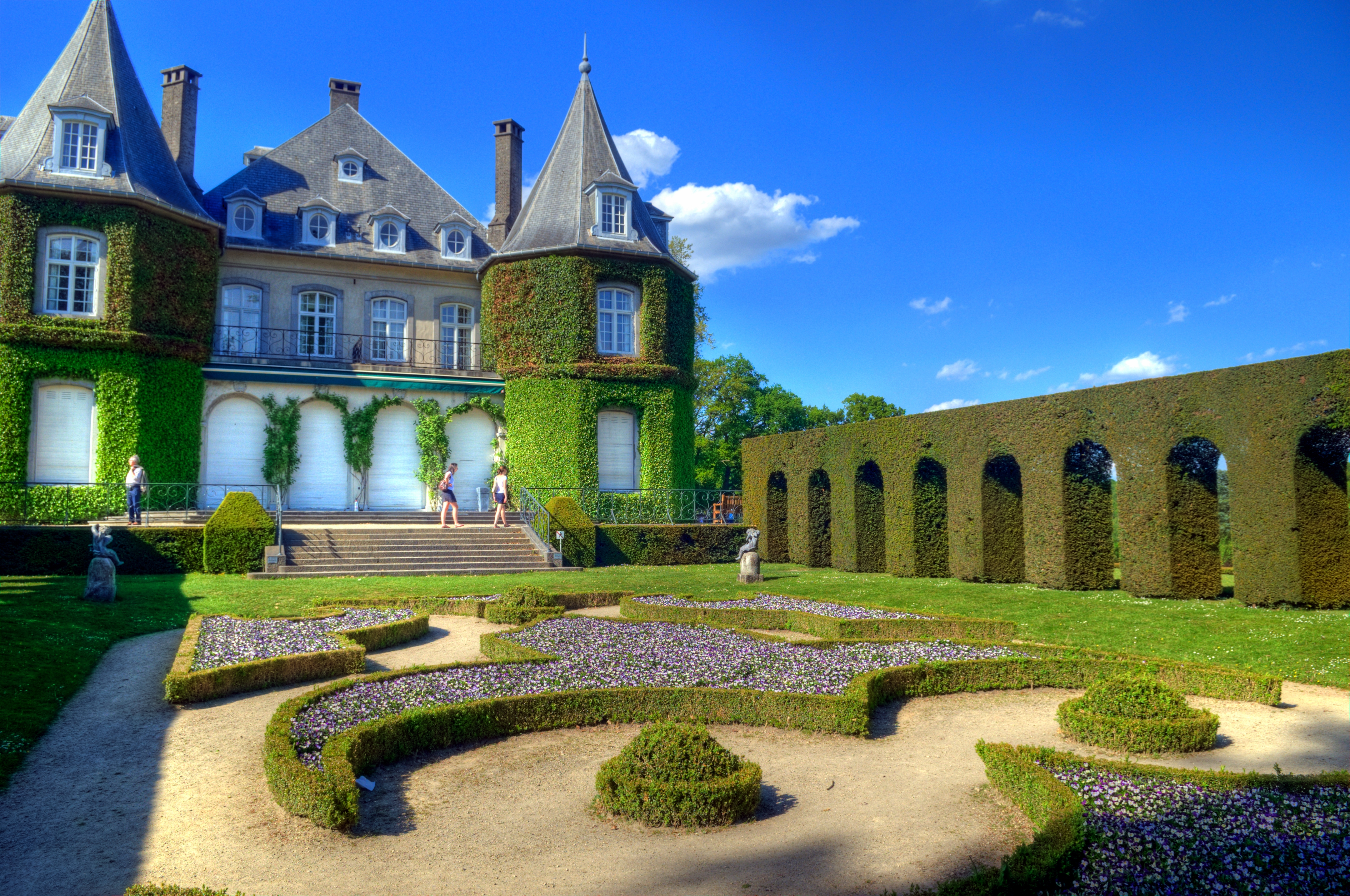 Château de la Hulpe